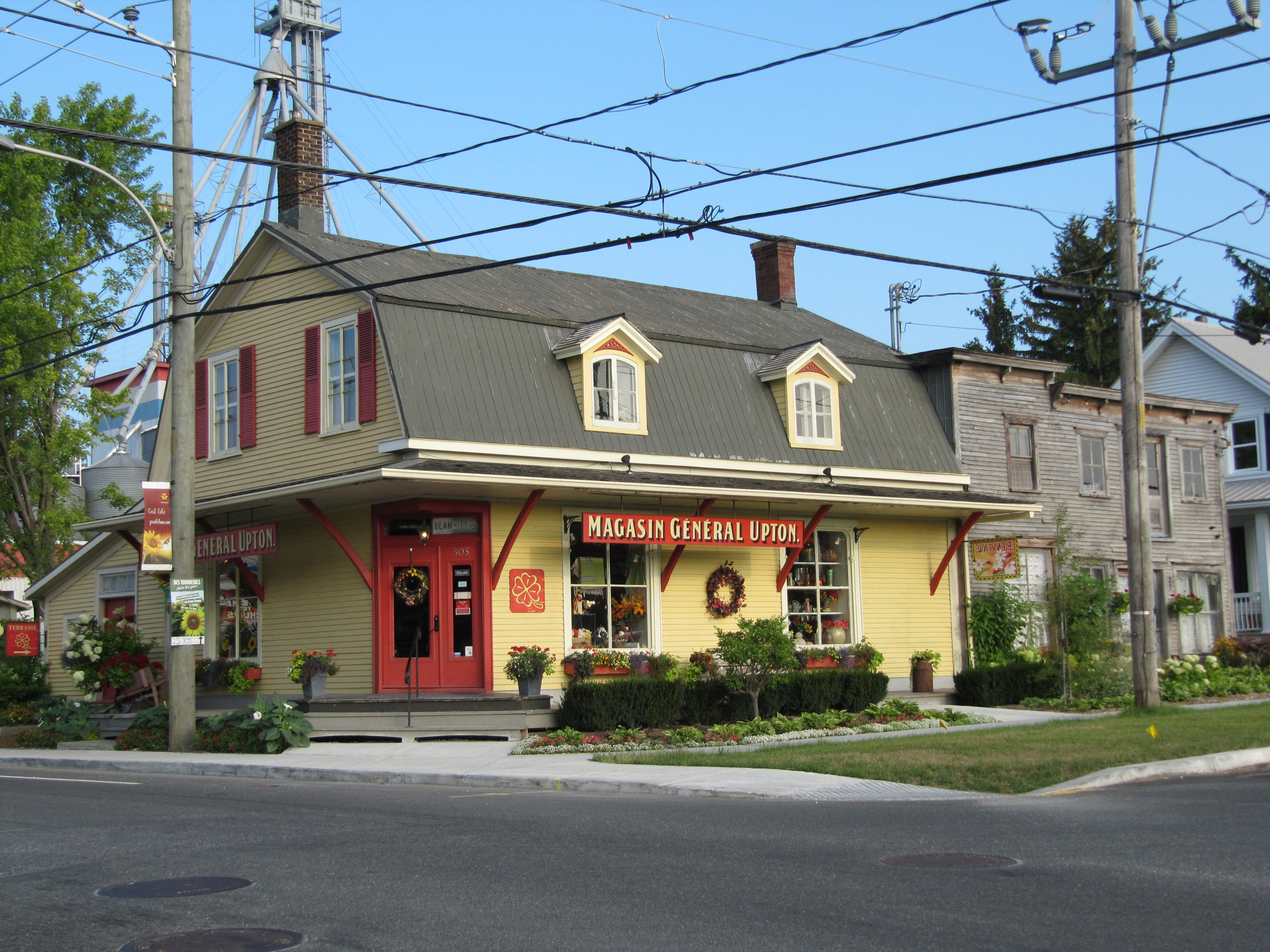 Magasin général à Upton (Québec)